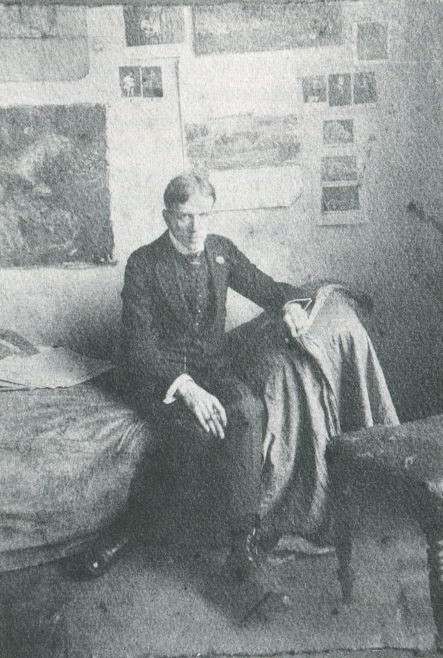 Porträt Fritz Friedrich in seinem Altelier